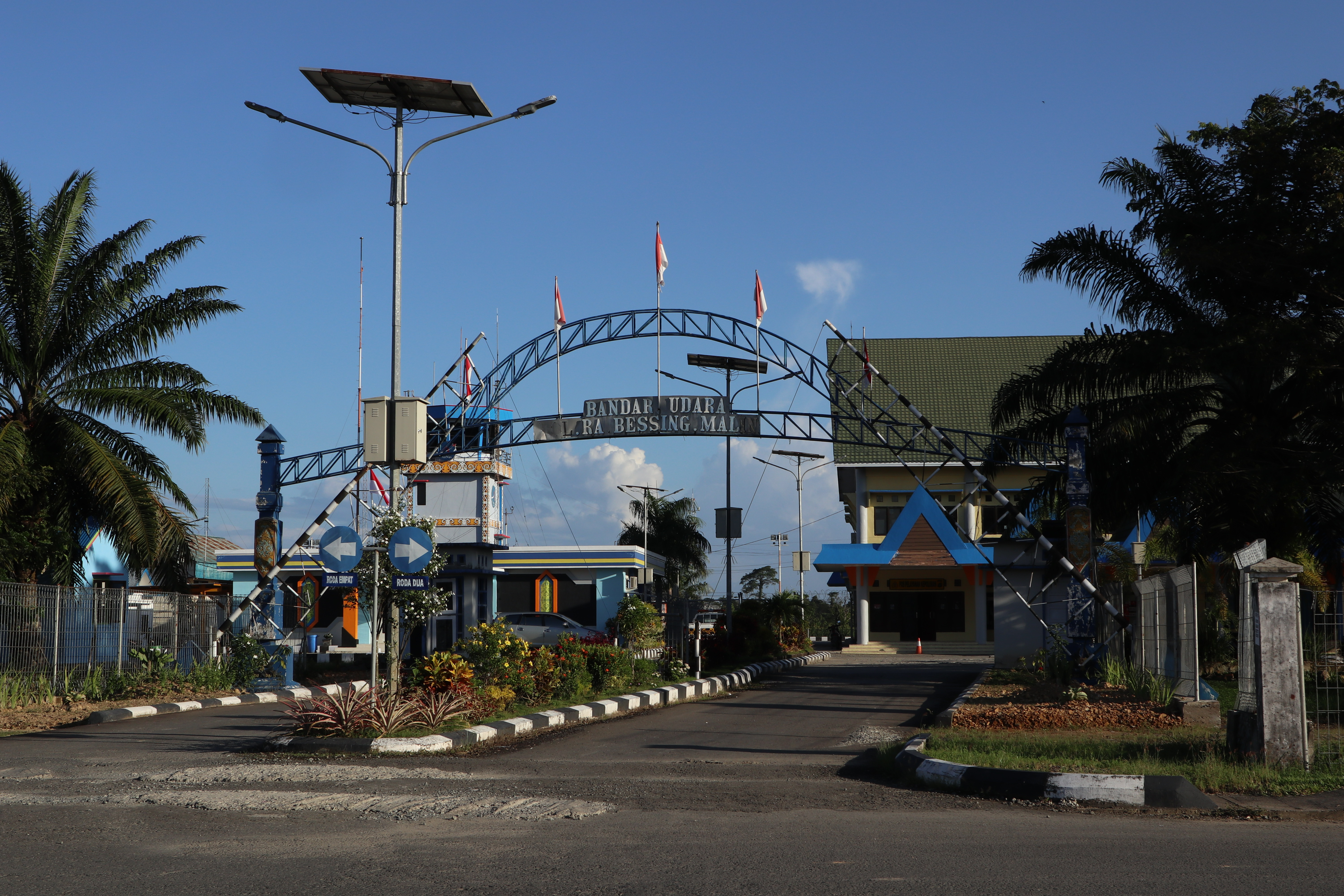 Gerbang masuk menuju areal Bandar Udara R.A. Bessing.